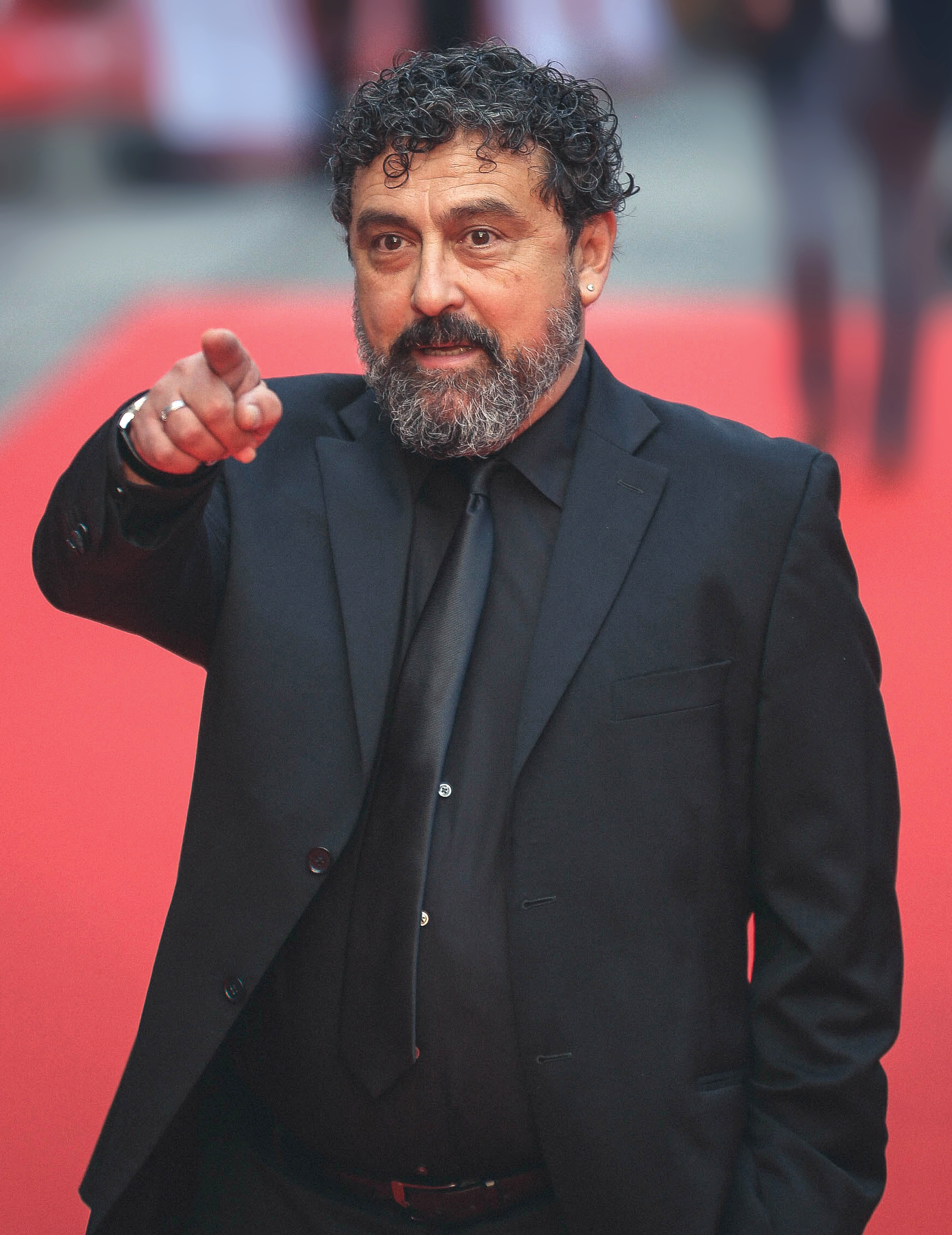 Seminci 2016